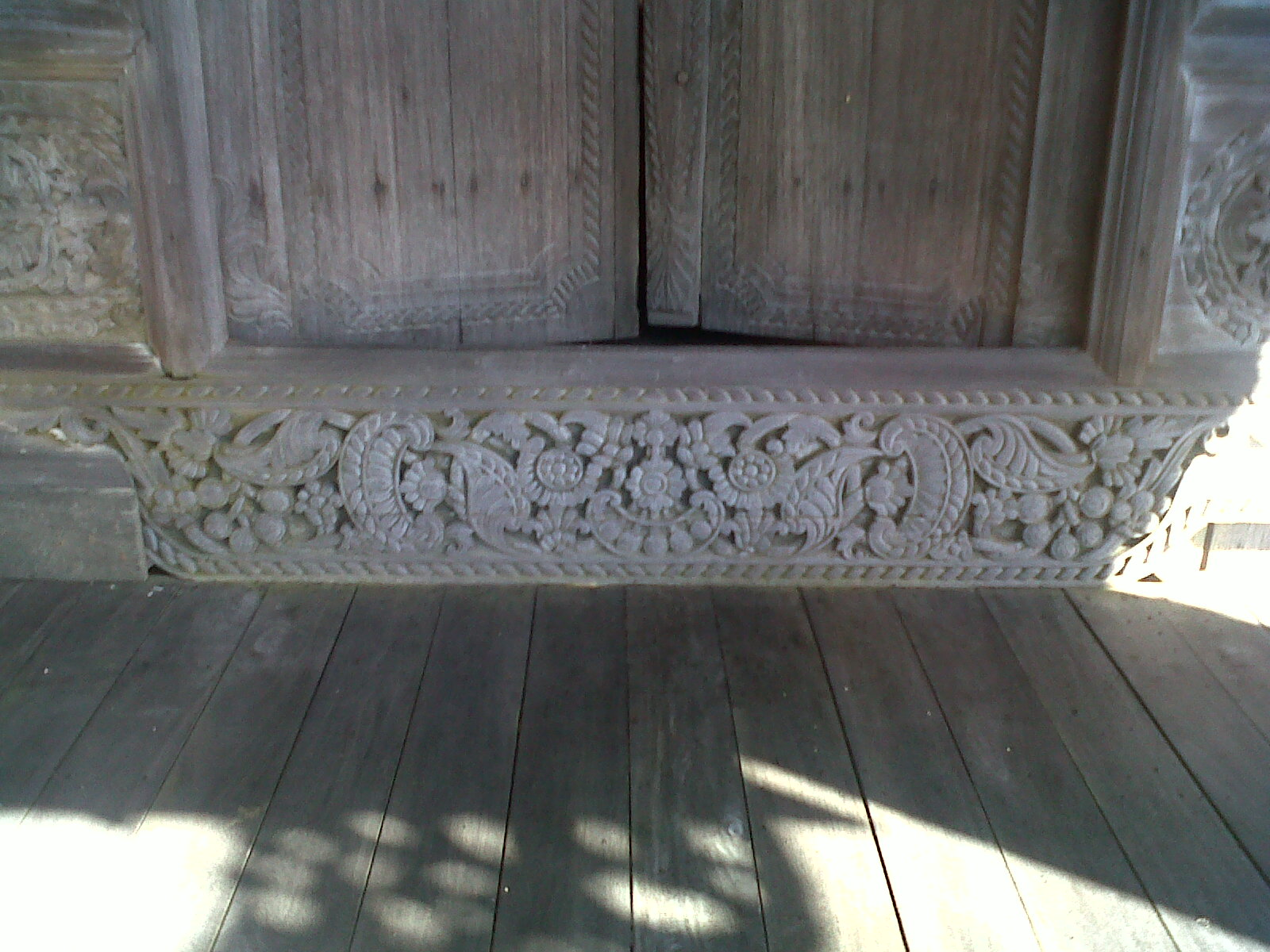 Watun Sambutan pada Rumah Bubungan Tinggi Desa HabirauTemplate:Threshold, Habirau Village High House